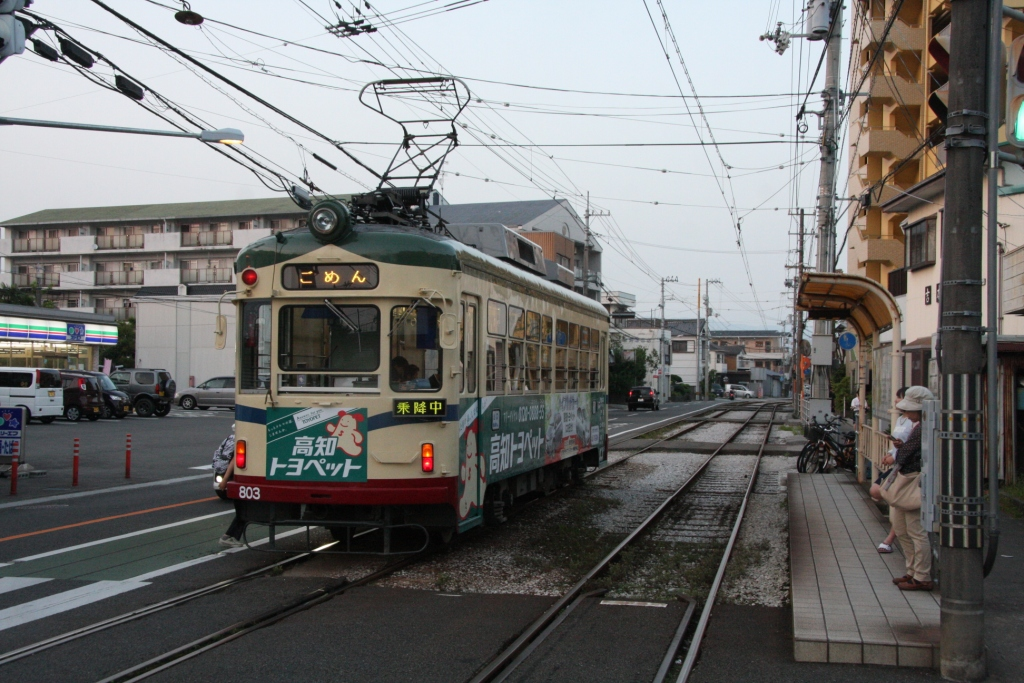 介良通停留場